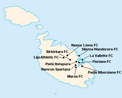 Répartition des clubs de Premier League Maltaise 2001-2002.